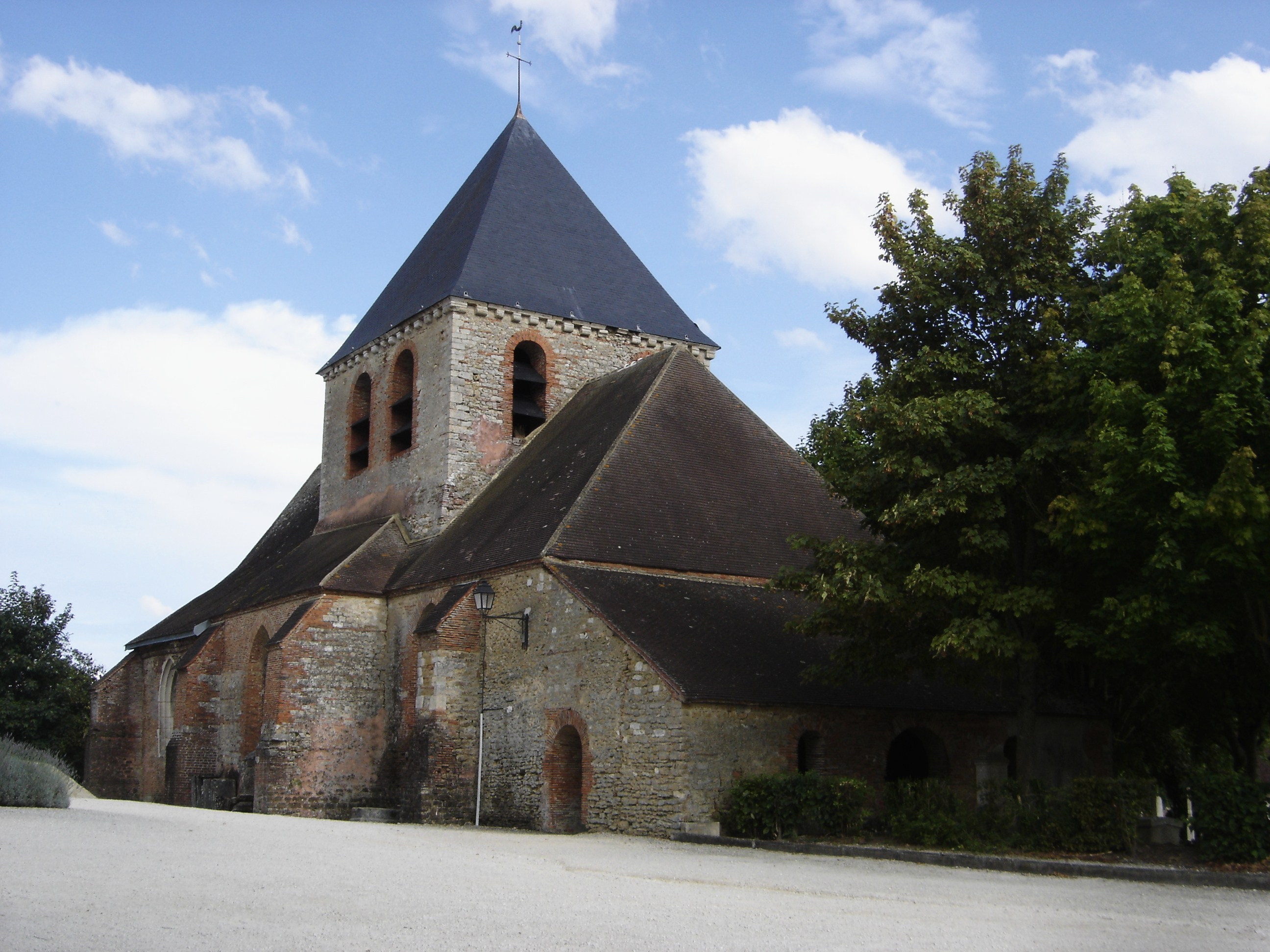 église Saint André - Mesnil-Saint-Père - Aube - France